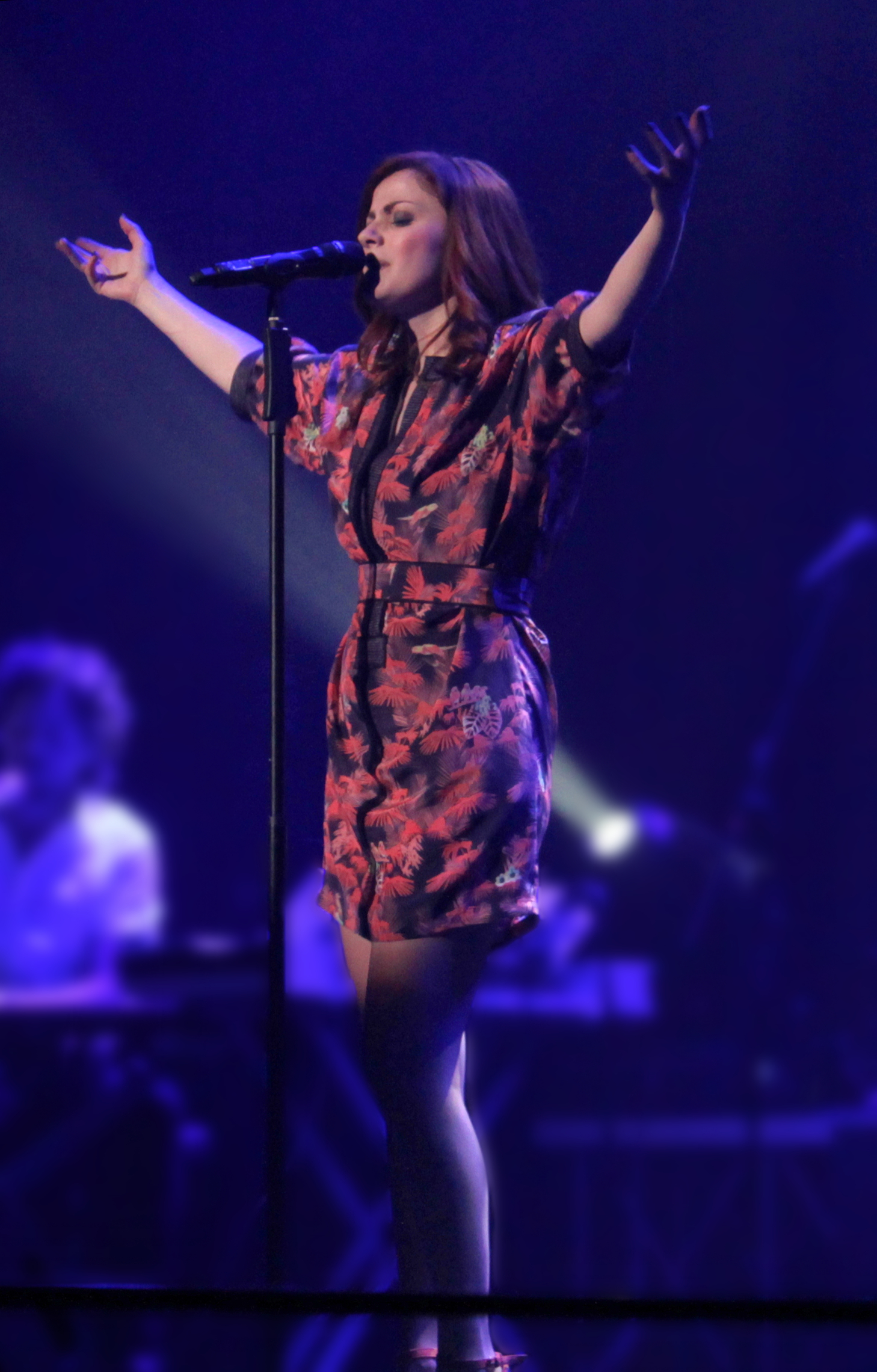 Annalisa Scarrone durante un concerto presso il Teatro Nazionale a Milano il 3 maggio 2013.